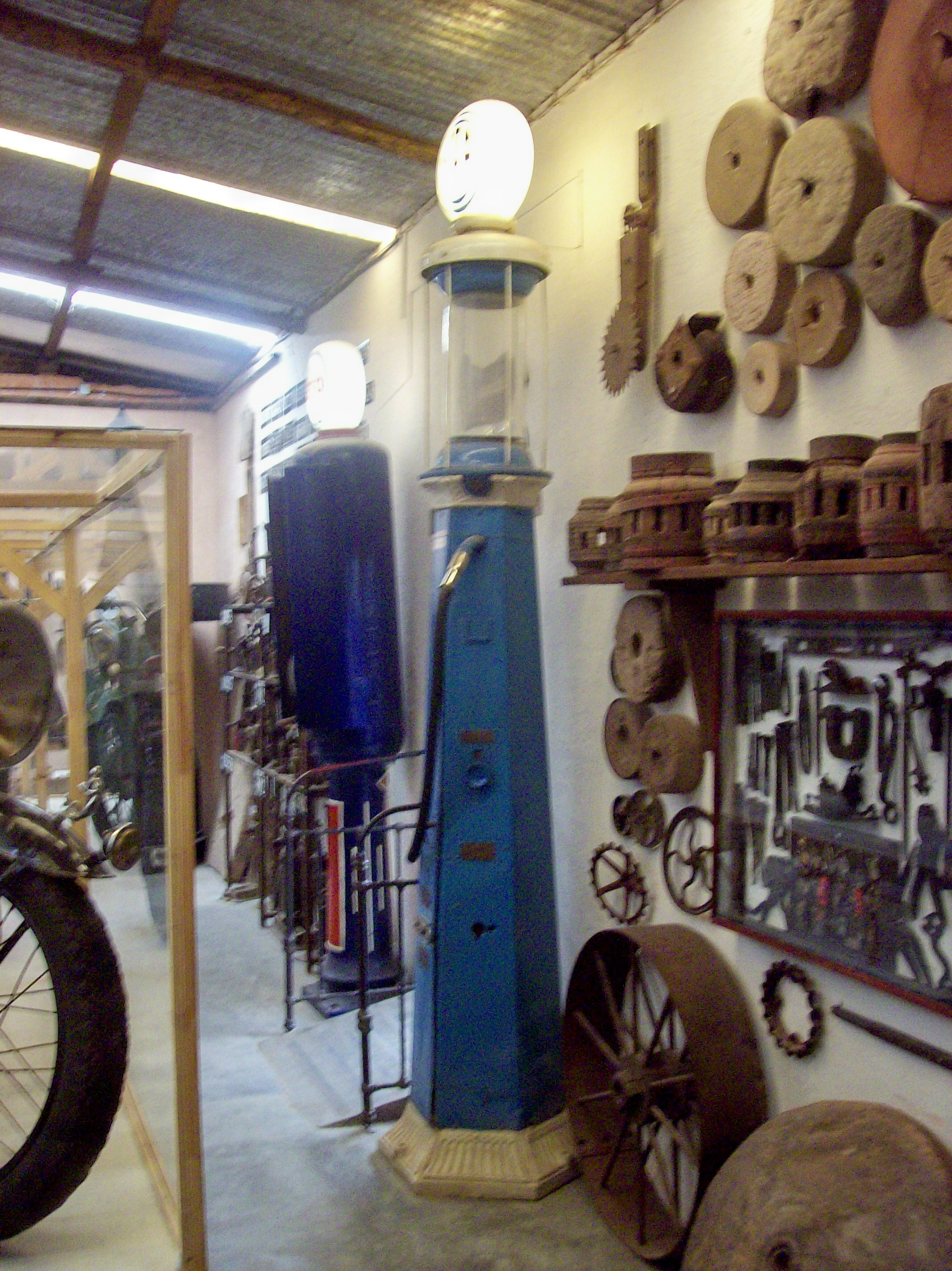 Rocsen, Museo Polifacético, en Nono, provincia de Córdoba, Argentina